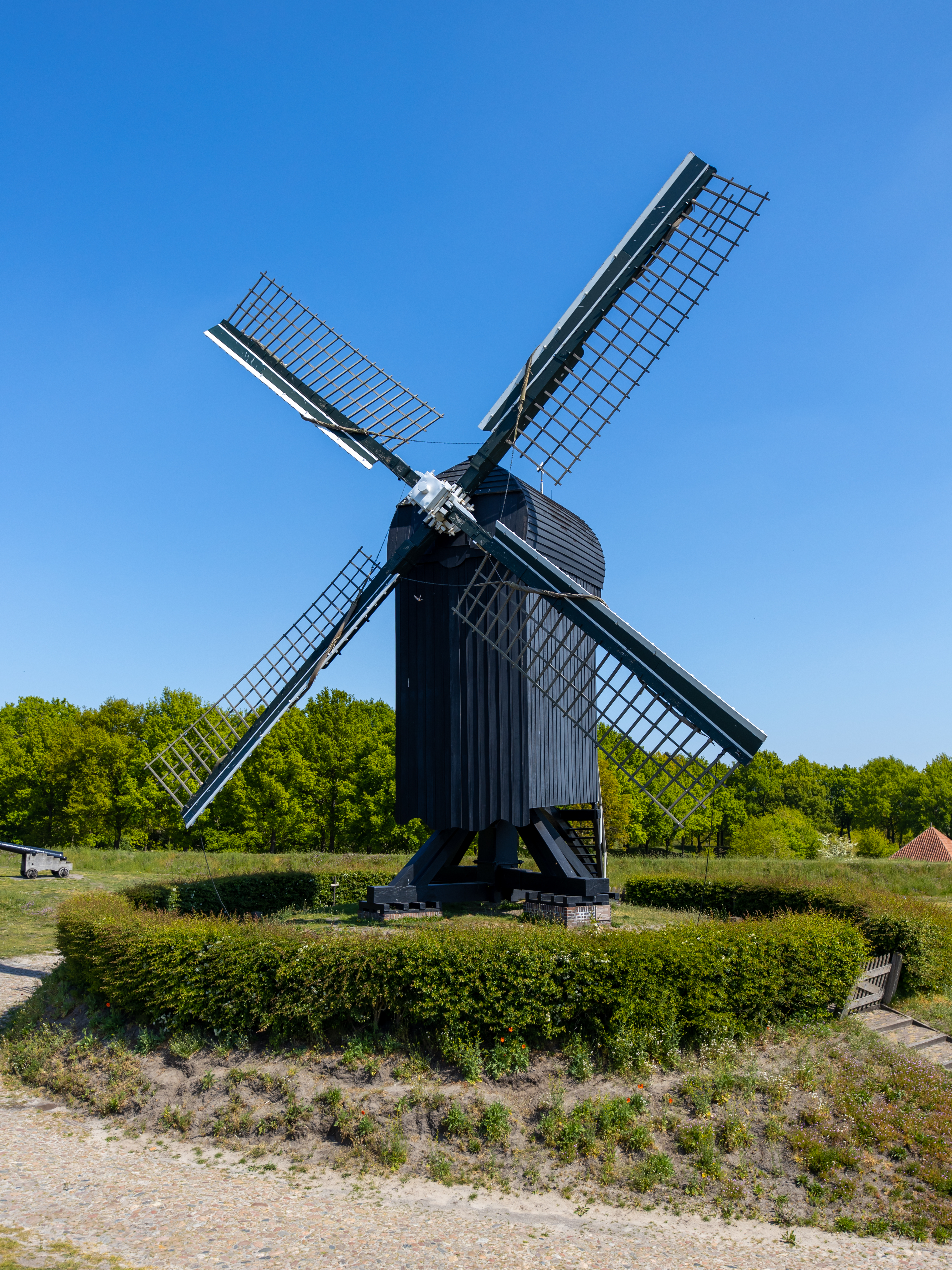 De Vestingmolen van Bourtange in 2020